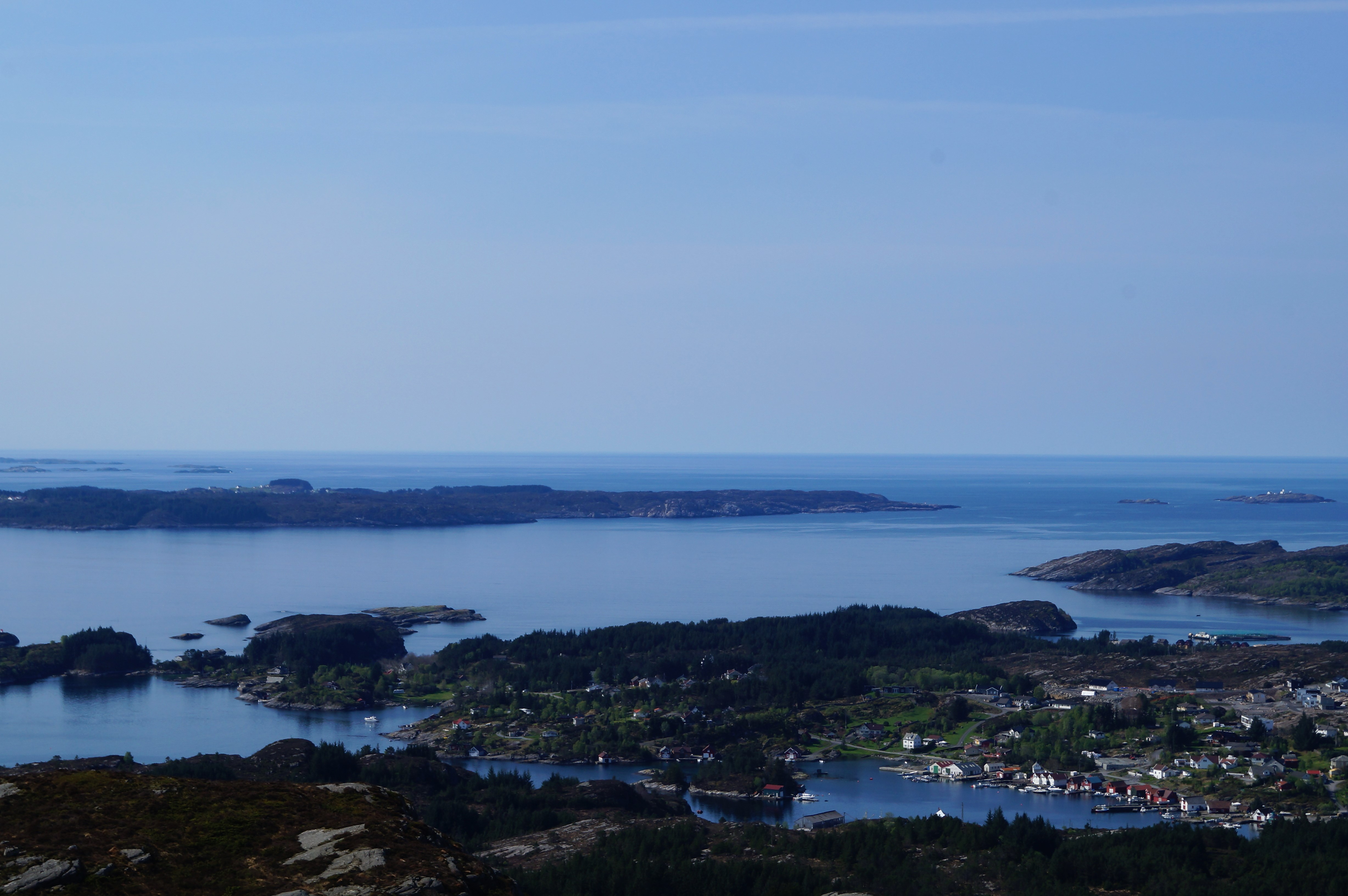 Ytre del av Korsfjorden sett fra fjelltoppen Kleppaksla